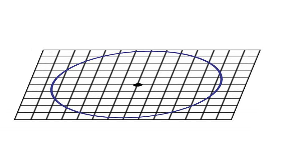 Modificado de File:Circulo 002 ttt.JPG, es otra modificación del plano contenedor (afinidad).